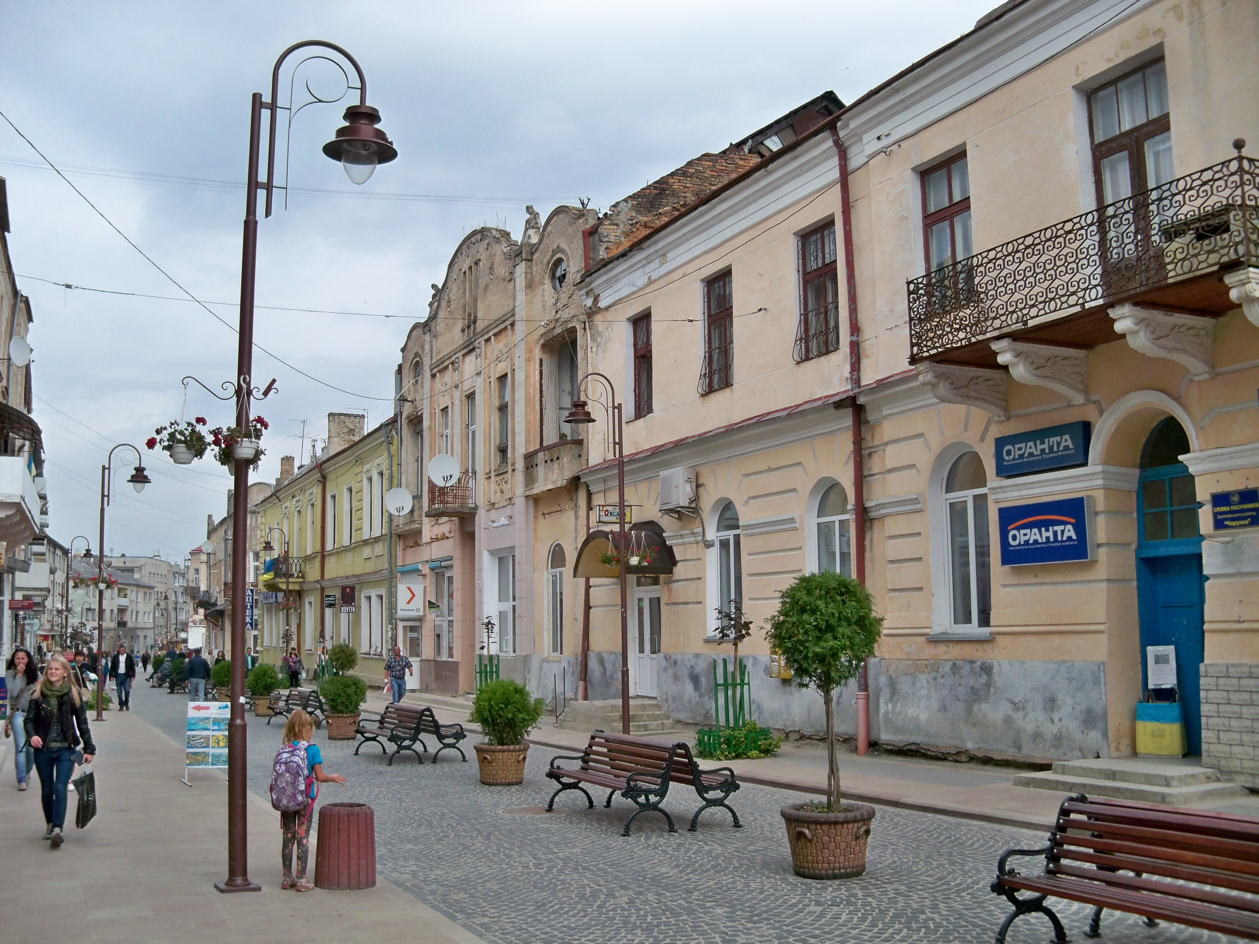 Житловий будинок, Золочів, вул. Шашкевича, 7